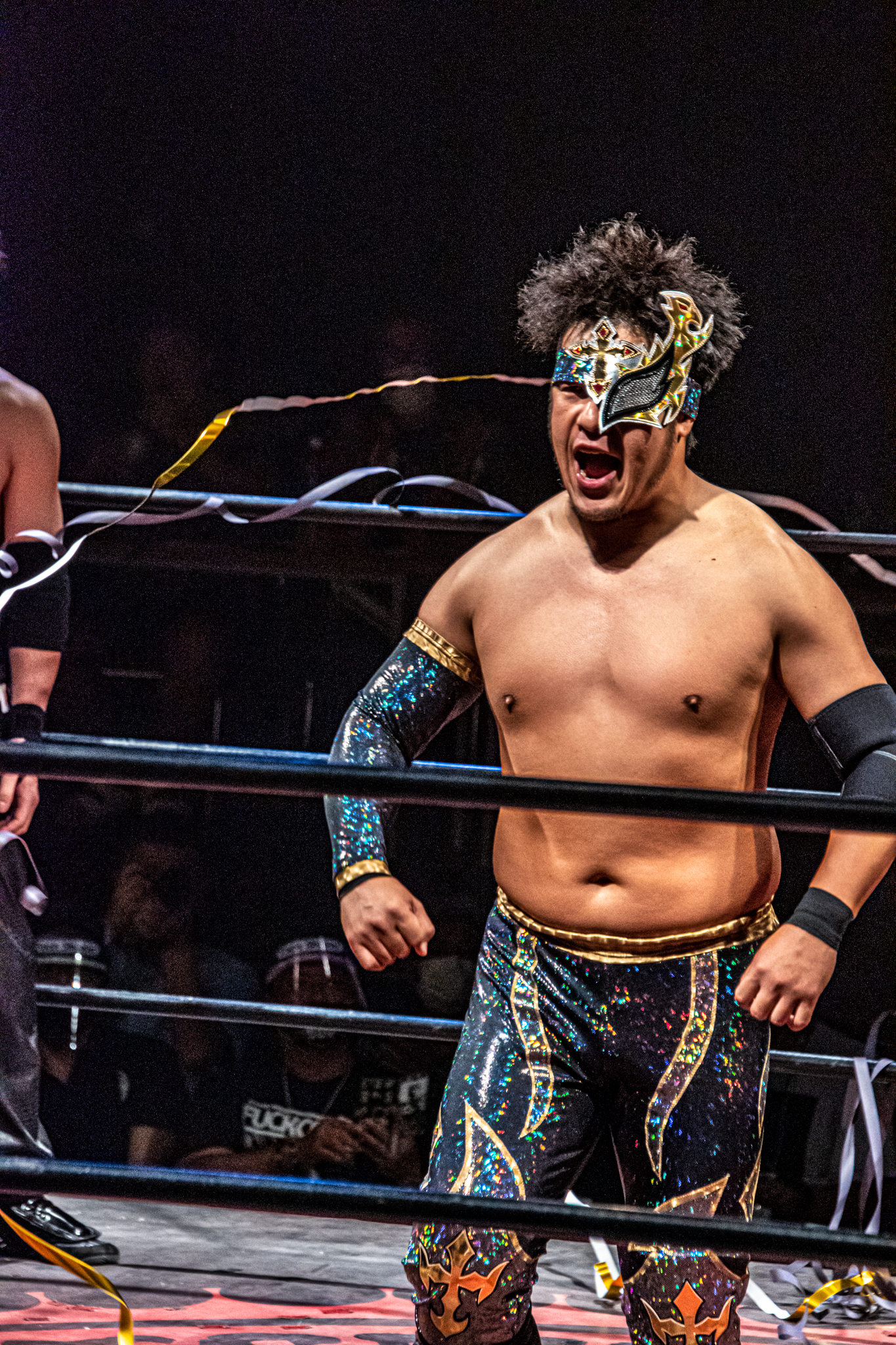 プロレスラーのHellbros Ken